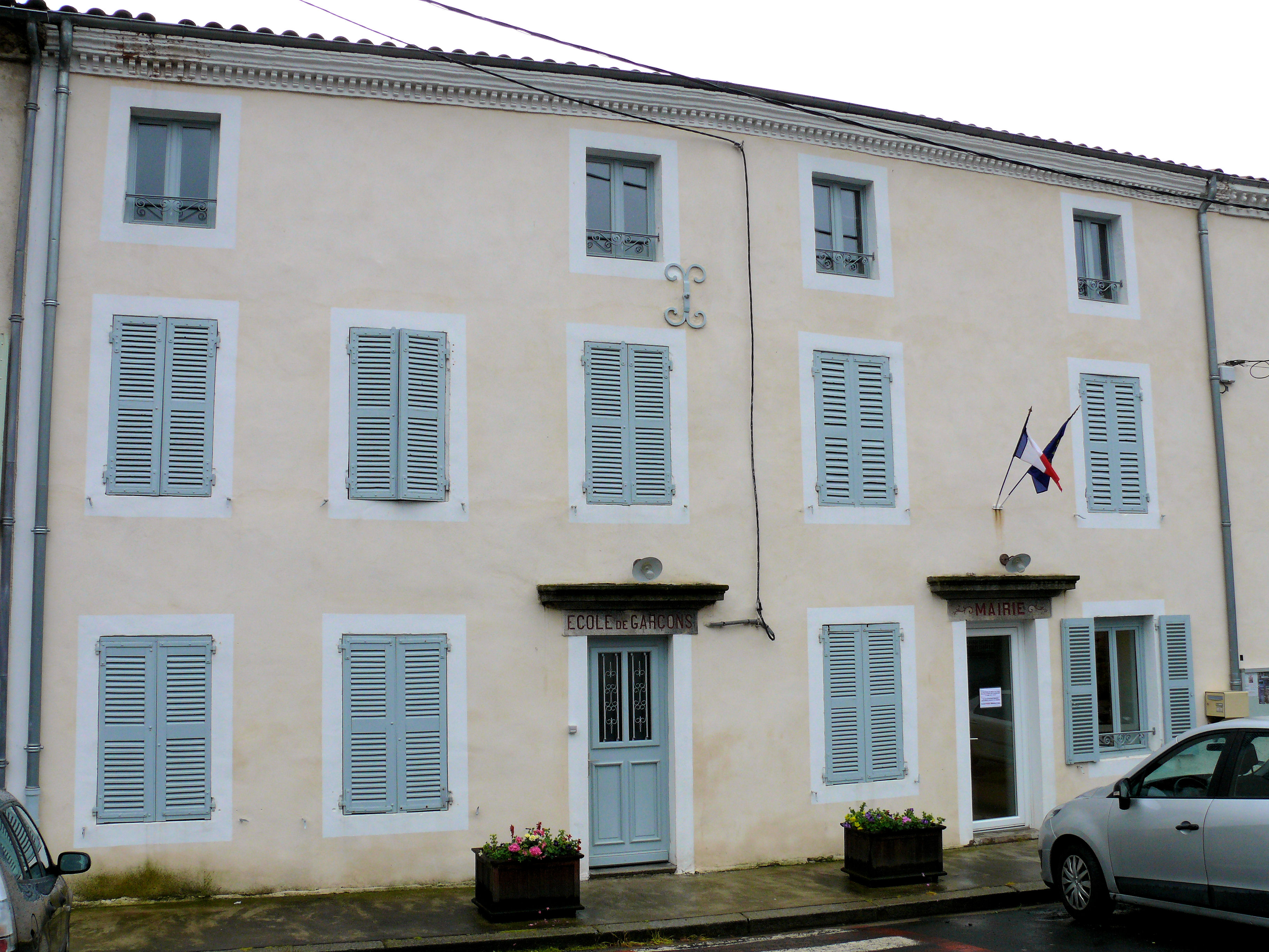 Manglieu - Mairie-école